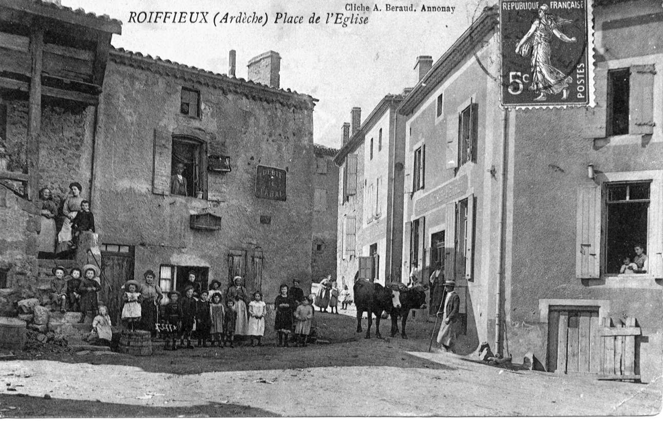 Roiffieux CP cafés anciens